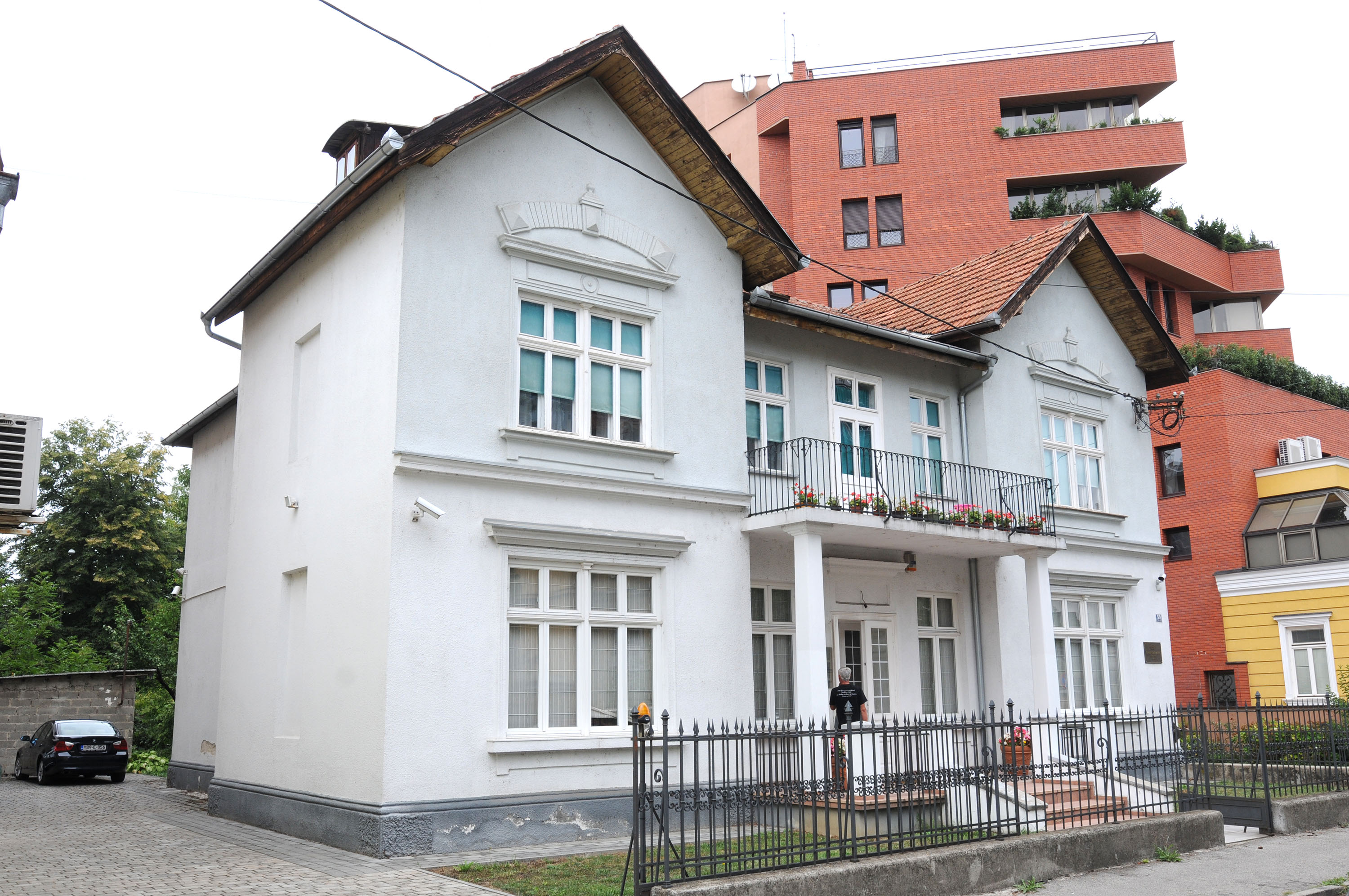 Banja Luka kuca Boze Nikolica ul petra Kocica 59 This image was uploaded as part of Trace of Soul 2015.